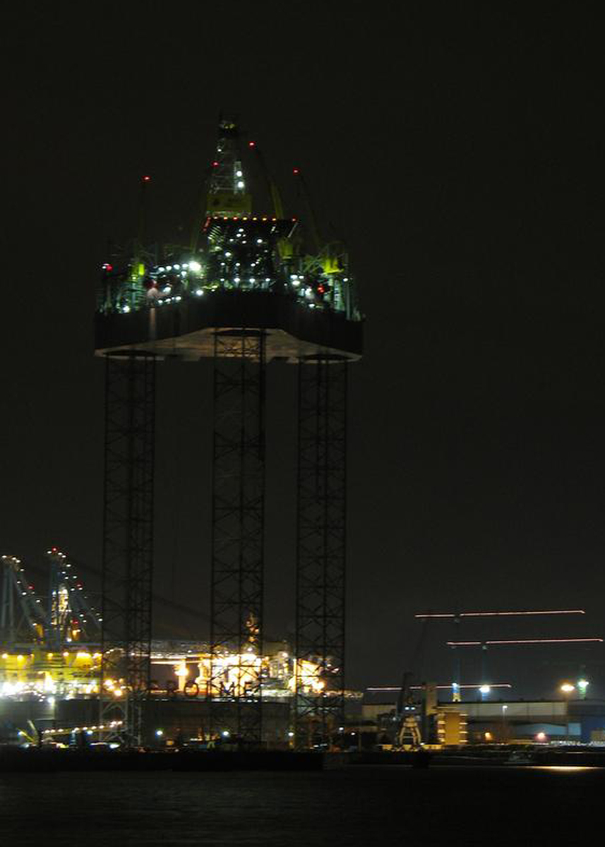 Jack-up rig Rowan Gorilla VII Drilling Rig, Independent Leg Cantilever in de Rotterdamse haven